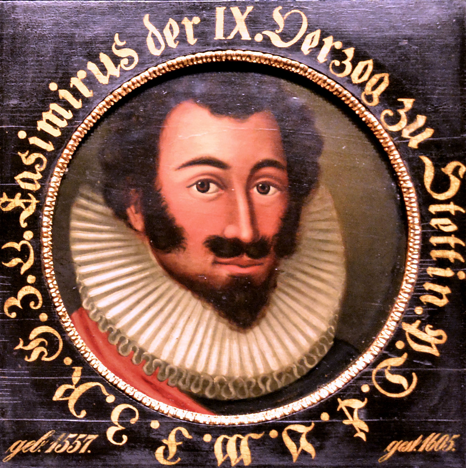 Portret księcia pomorskiego Kazimierza VII (IX), autor nieznany, 1678 r. Obecnie eksponat Muzeum Narodowego w Szczecinie